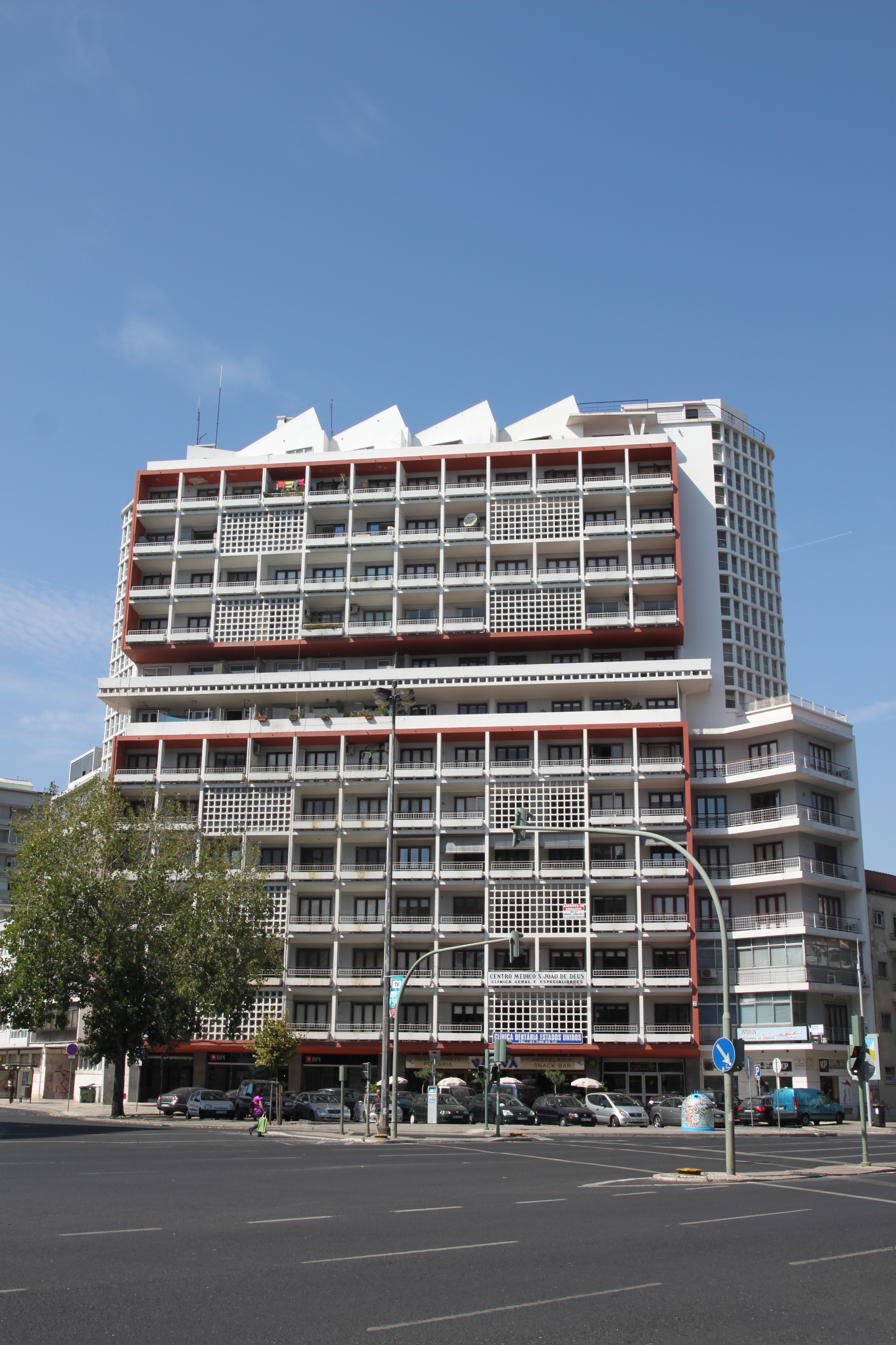 Conjunto de edifícios no cruzamento das avenidas de Roma e dos Estados Unidos da América This file was uploaded for Wiki Loves Monuments in Portugal with the unique identifier 97024668.